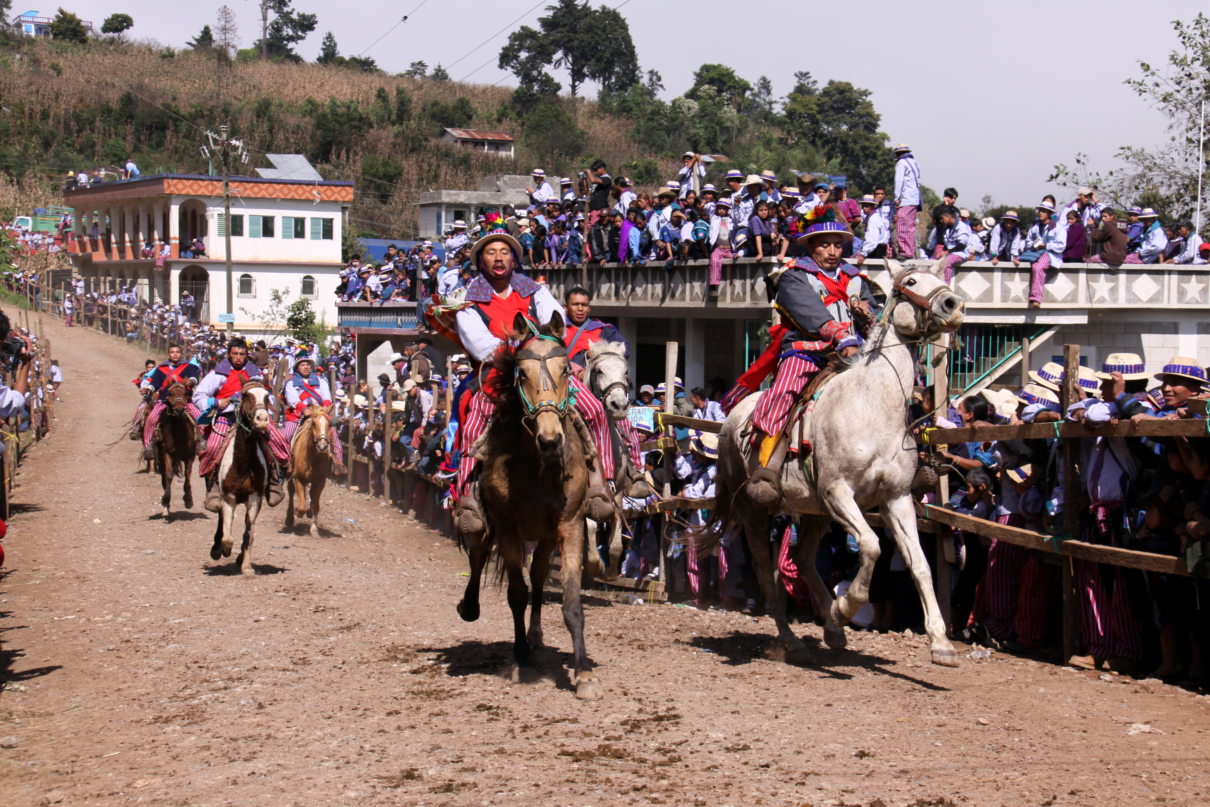 course de chevaux de la toussaint a Todos Santos guatemala en|The horse race during Feast of All Saints in Todos Santos Cuchumatán, Guatemala